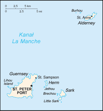 Mapa Guernsey, CIA World Factbook, wersja polska